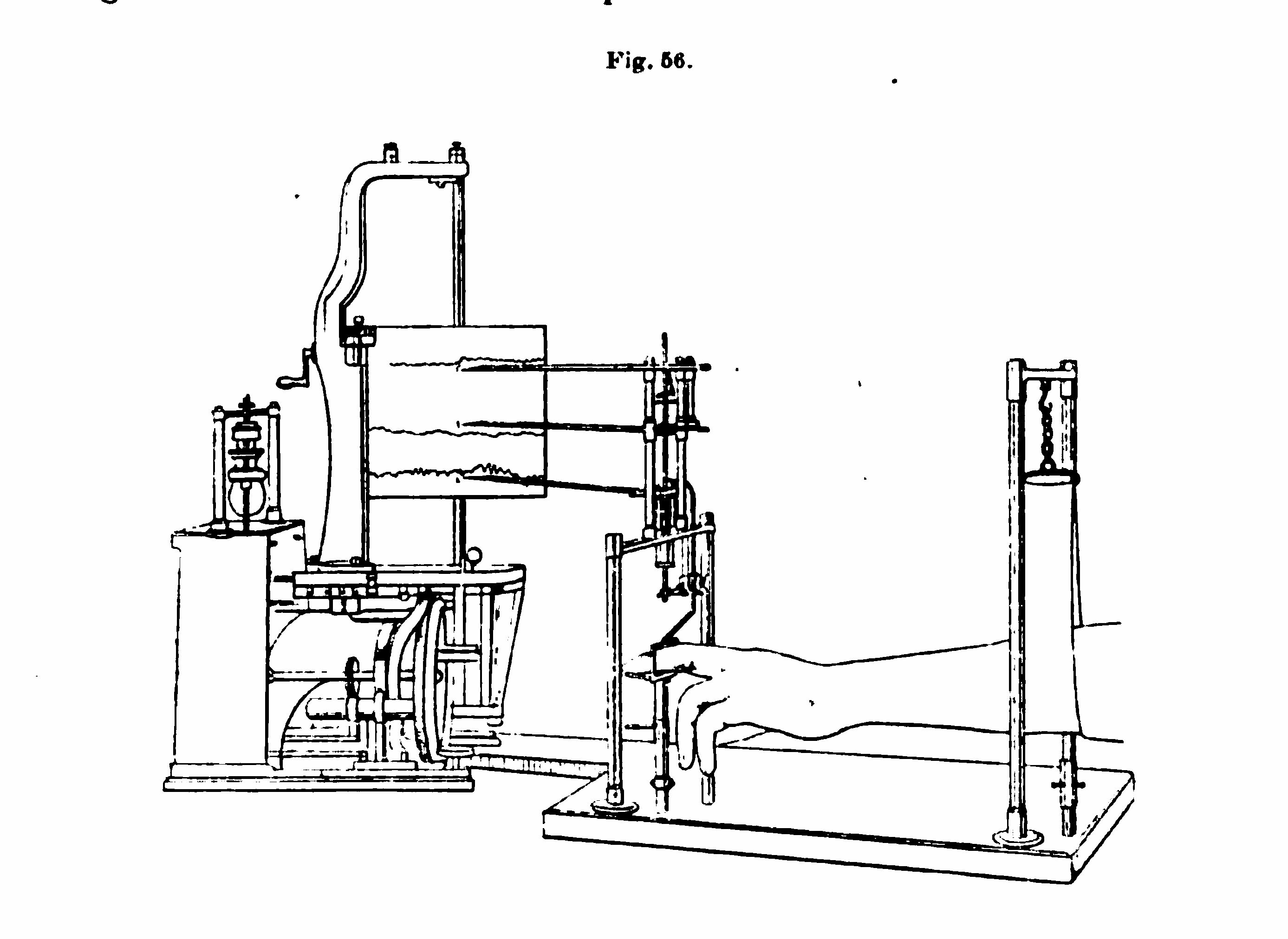 Apparat zur dreidimensionalen Analyse der Ausdrucksbewegungen der Hände, entwickelt von Robert Sommer